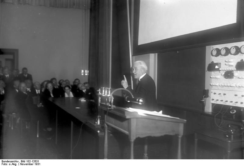 Der hervorragende amerikanische Nobelpreisträger für Physik Prof. Millicam spricht vor deutschen Gelehrten ! Der amerikanische Nobelpreisträger für Physik Prof. Millicam spricht vor deutschen Gelehrten im Harnack-Haus der Kaiser-Wilhelmgesellschaft in Berlin.